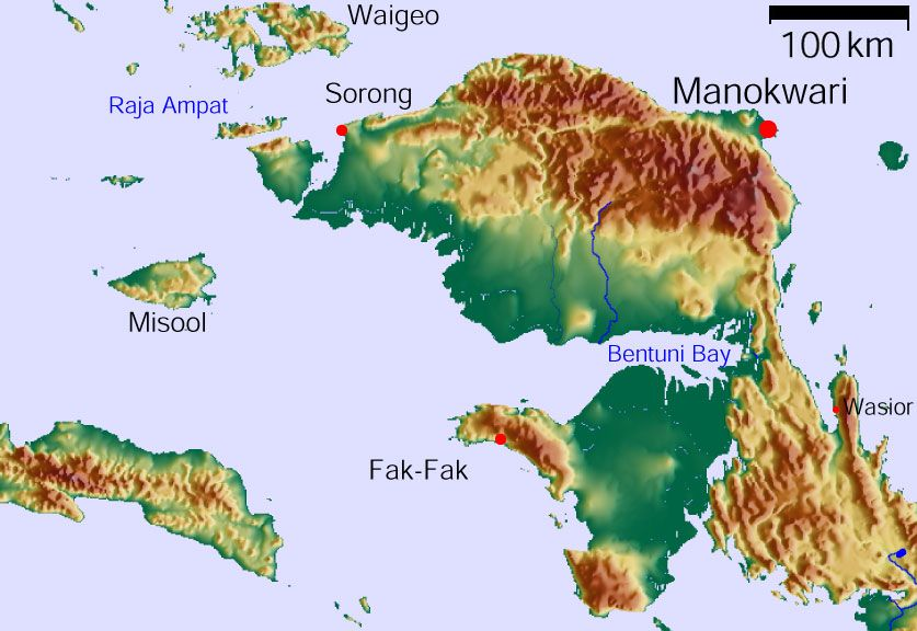 Vogelkop Peninsula, West Papua (Indonesia)